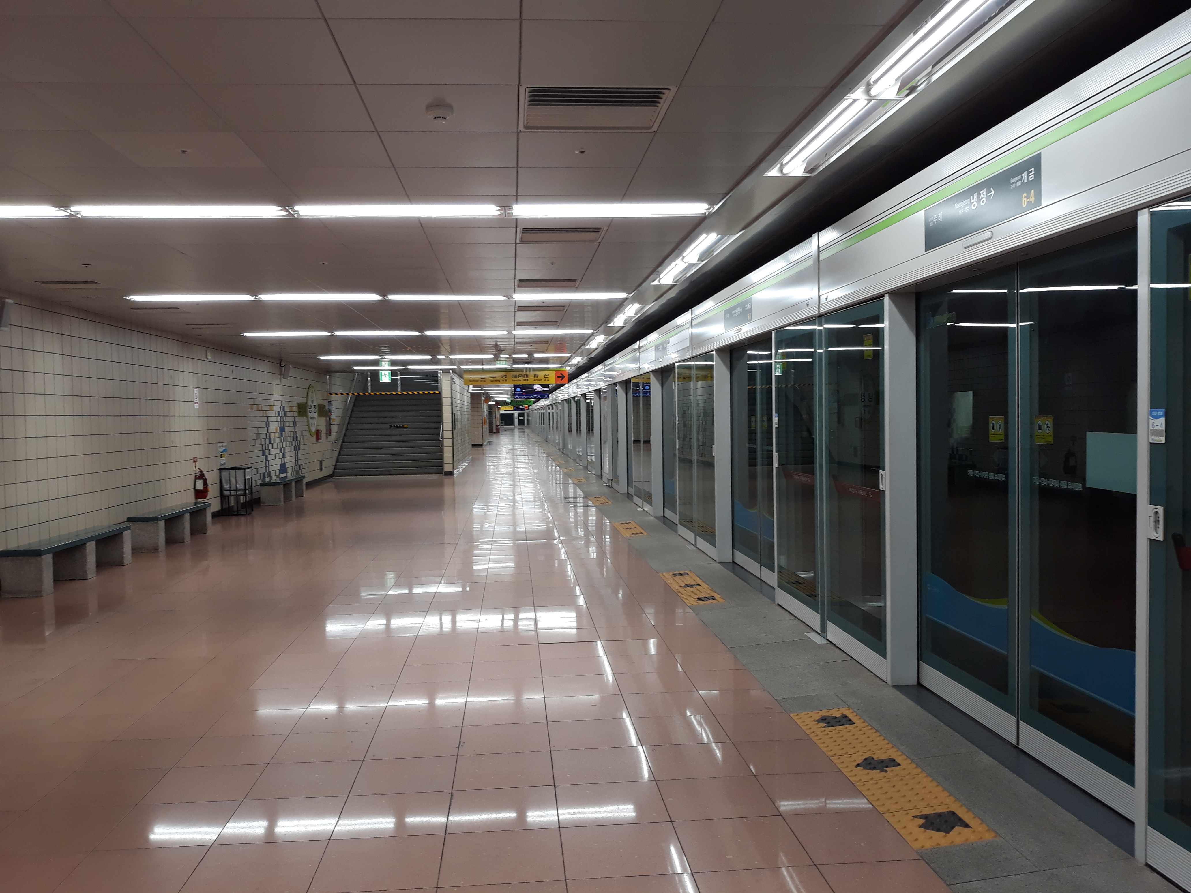 부산 도시철도 2호선 냉정역 장산 방면 승강장